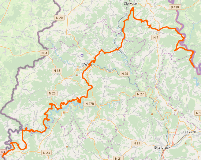 Streck vum Ardennen-Äifel-Pad